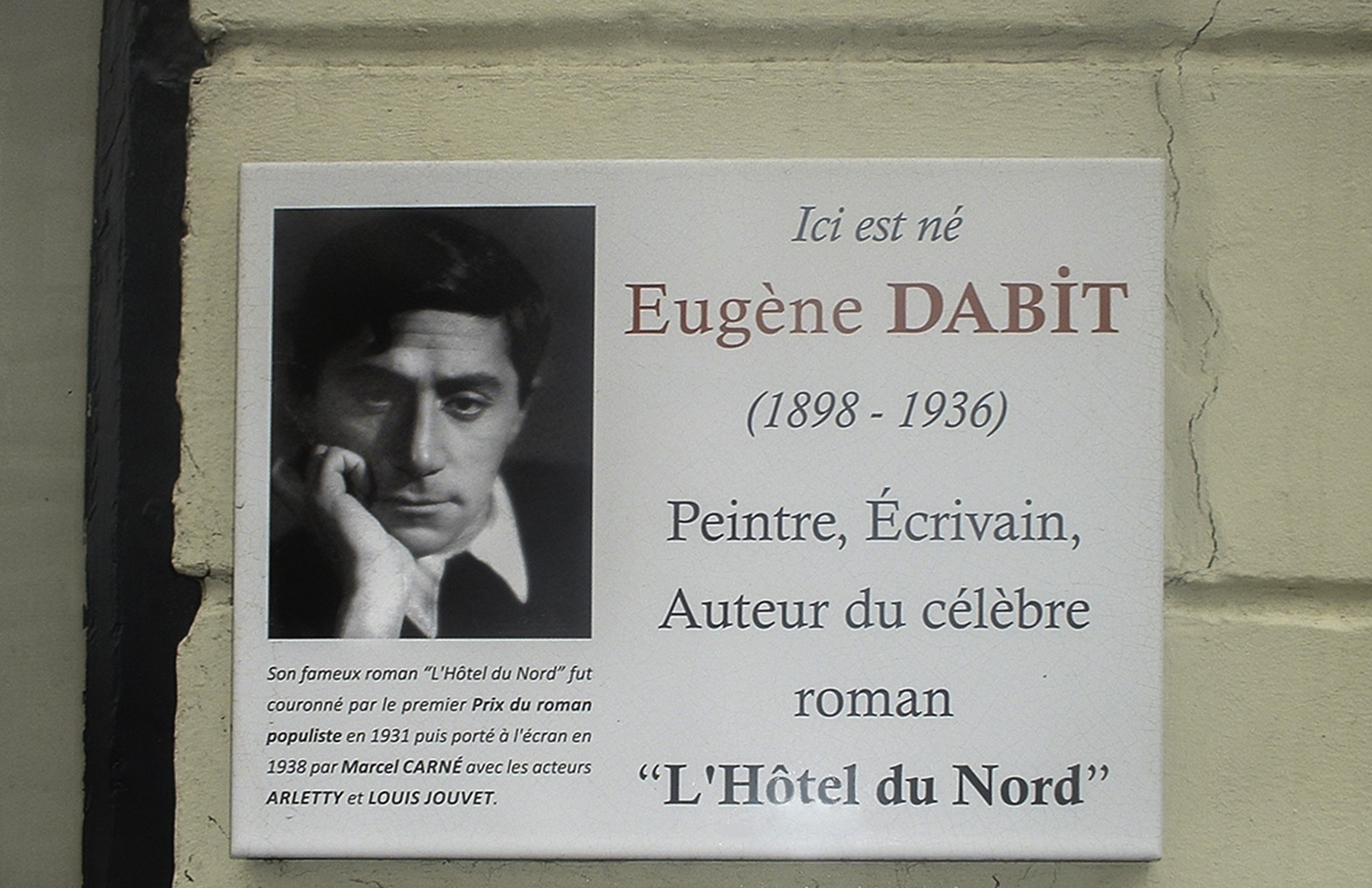 plaque commémorative